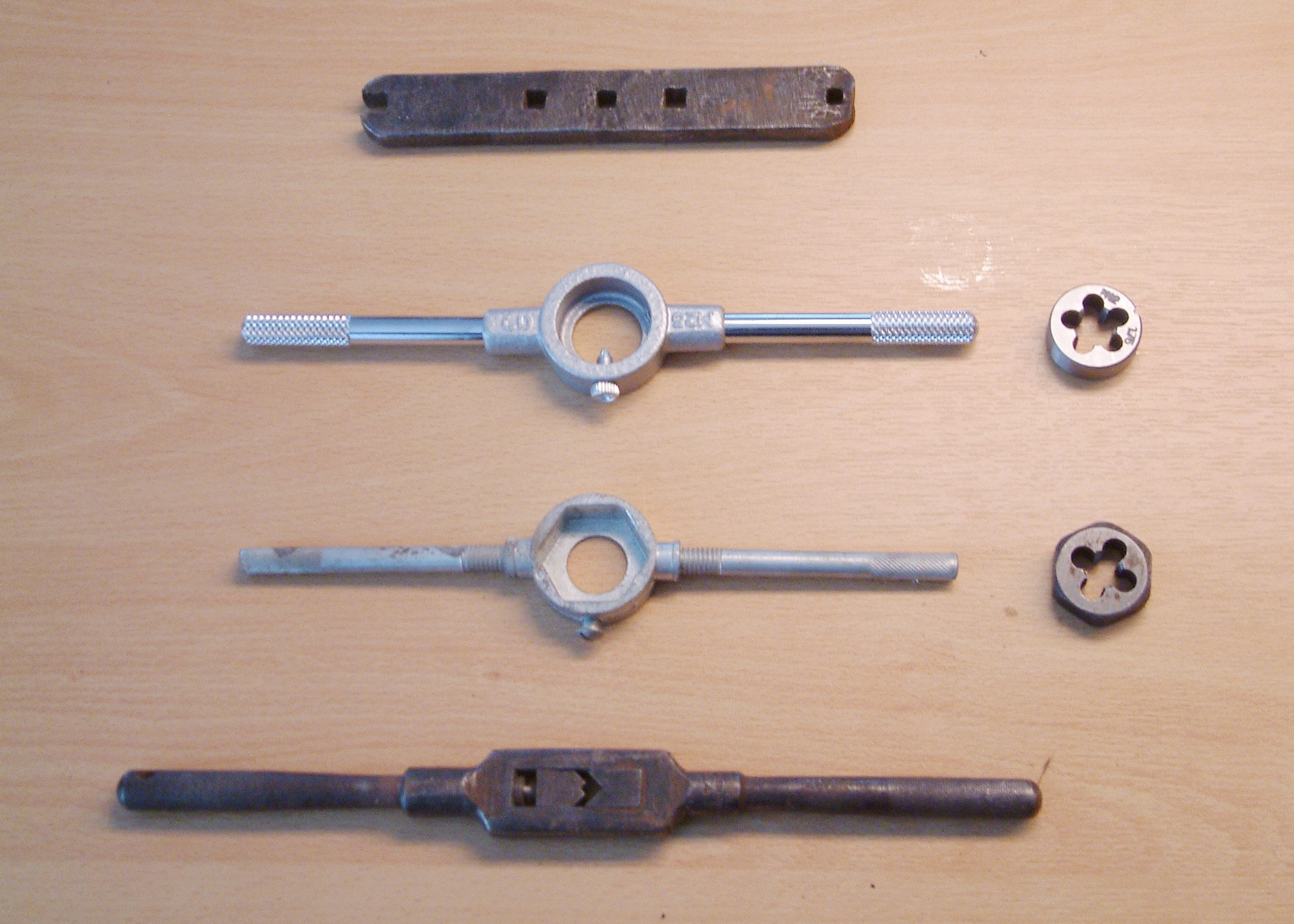 Van boven naar beneden: Oud wringijzer voor kleine tappen, wringijzer voor snijblok, wringijzer voor snijmoer en wringijzer voor tappen